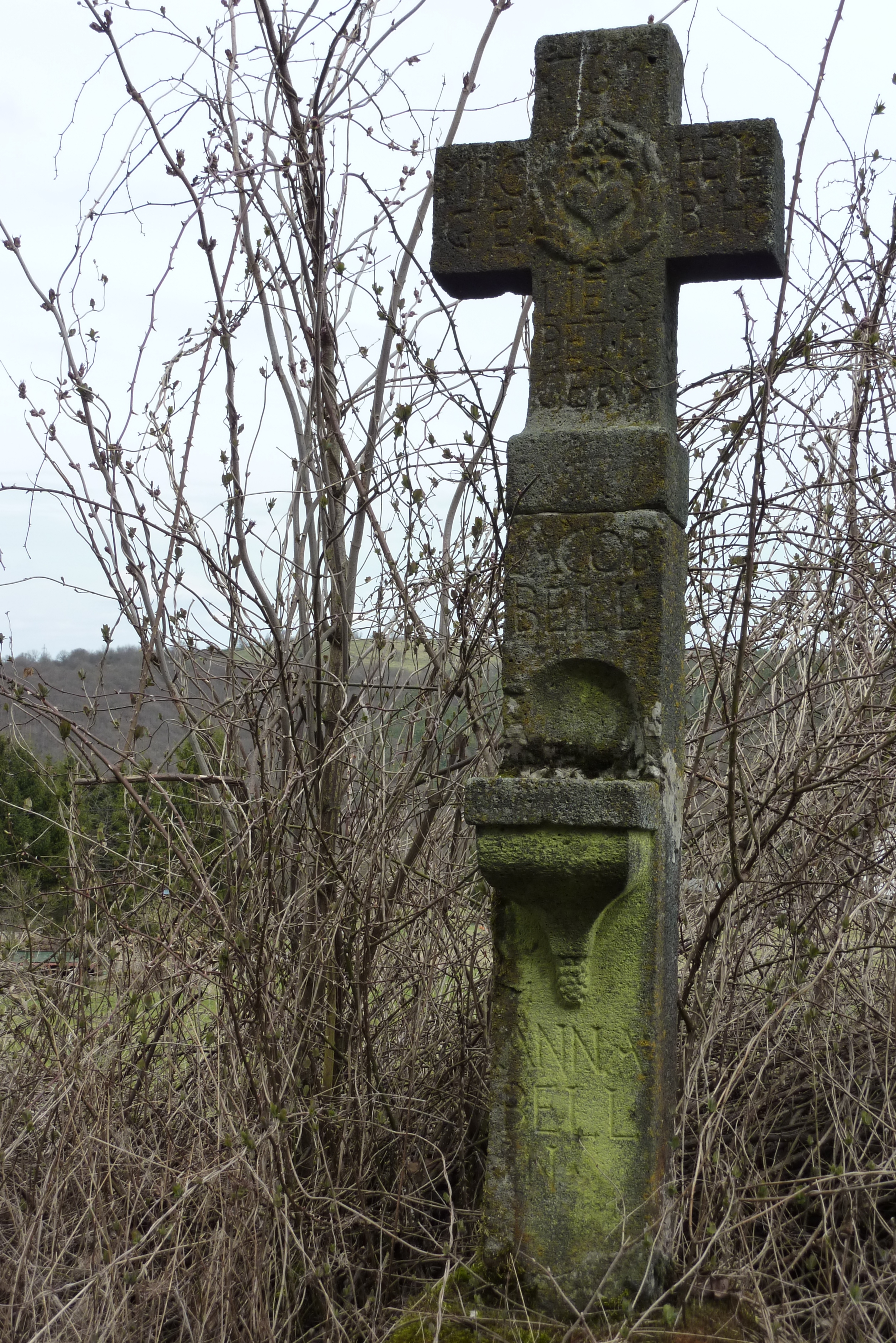 Wegekreuz in Blasweiler, Ortsteil von Heckenbach, bezeichnet 1767 ?